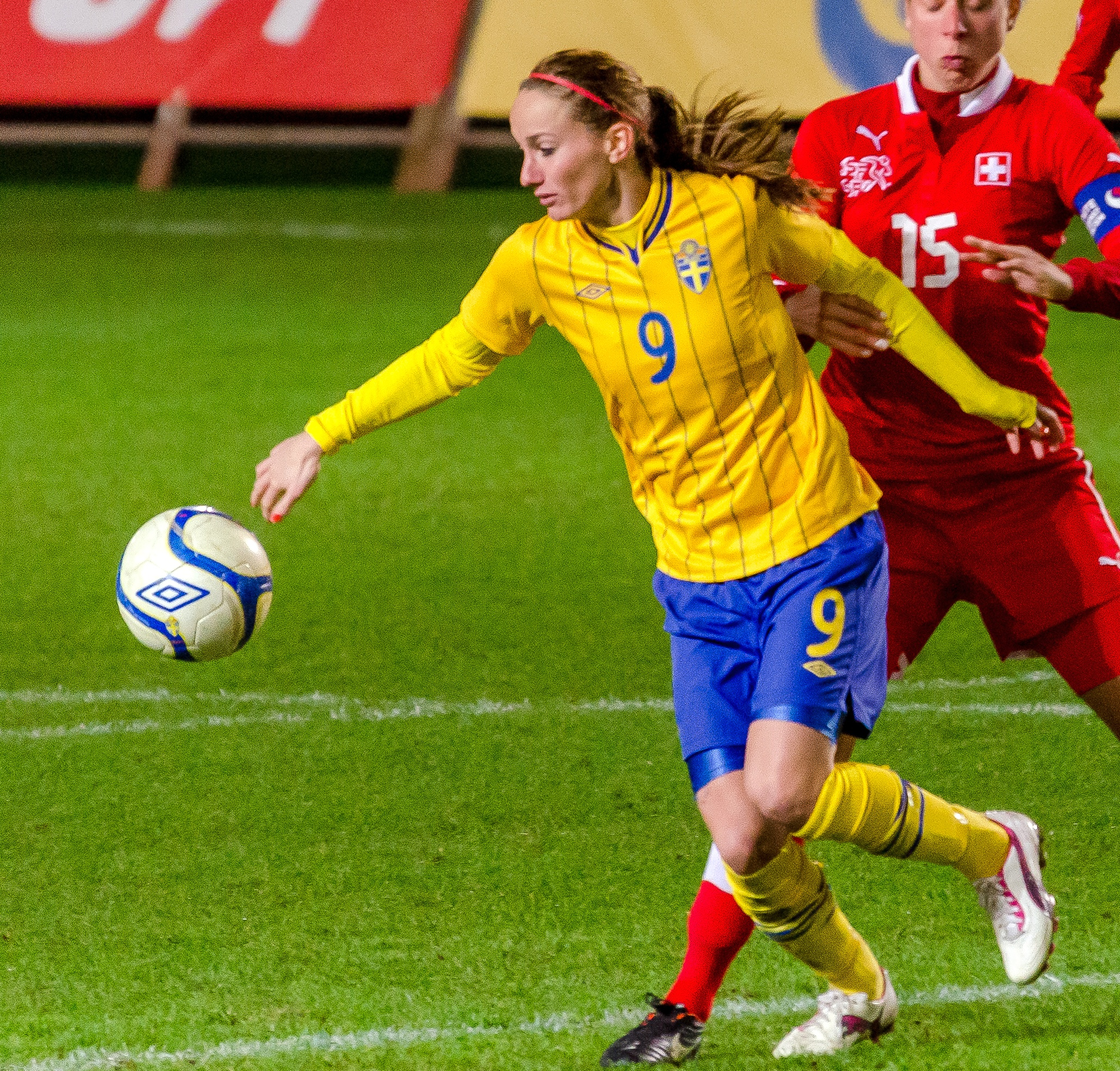 Den svenska anfallaren Kosovare Asllani den första landskampen på Myresjöhus Arena (tillika Pia Sundhages debut som svensk förbundskapten) 23 oktober 2012, där Sverige slog Schweiz med 3-0 inför 4905 åskådare.